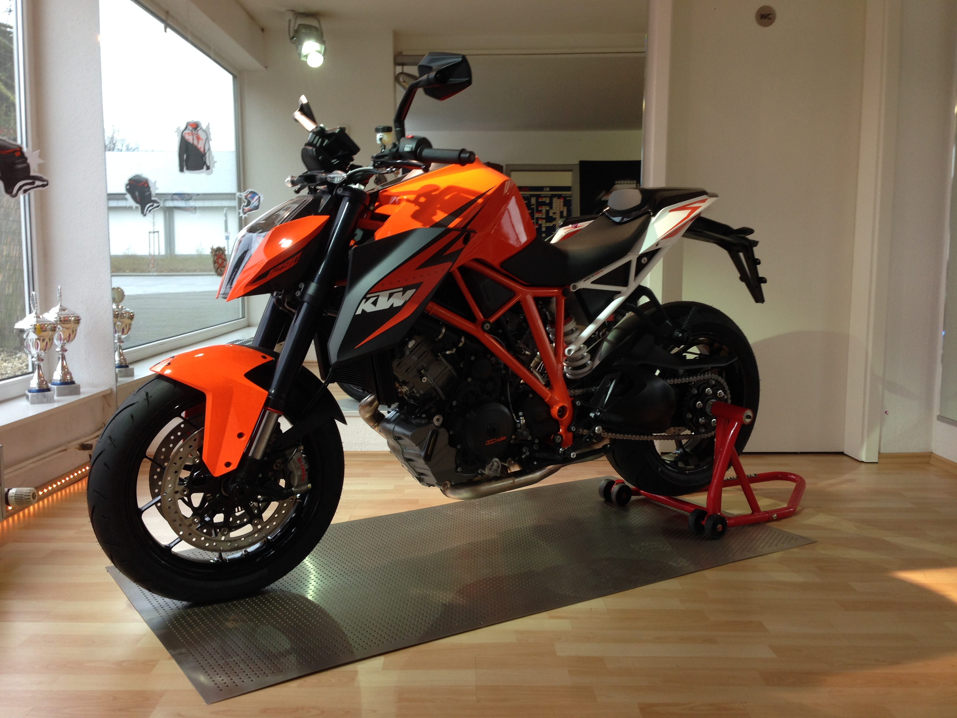 KTM 1290 Super Duke Seitenansicht